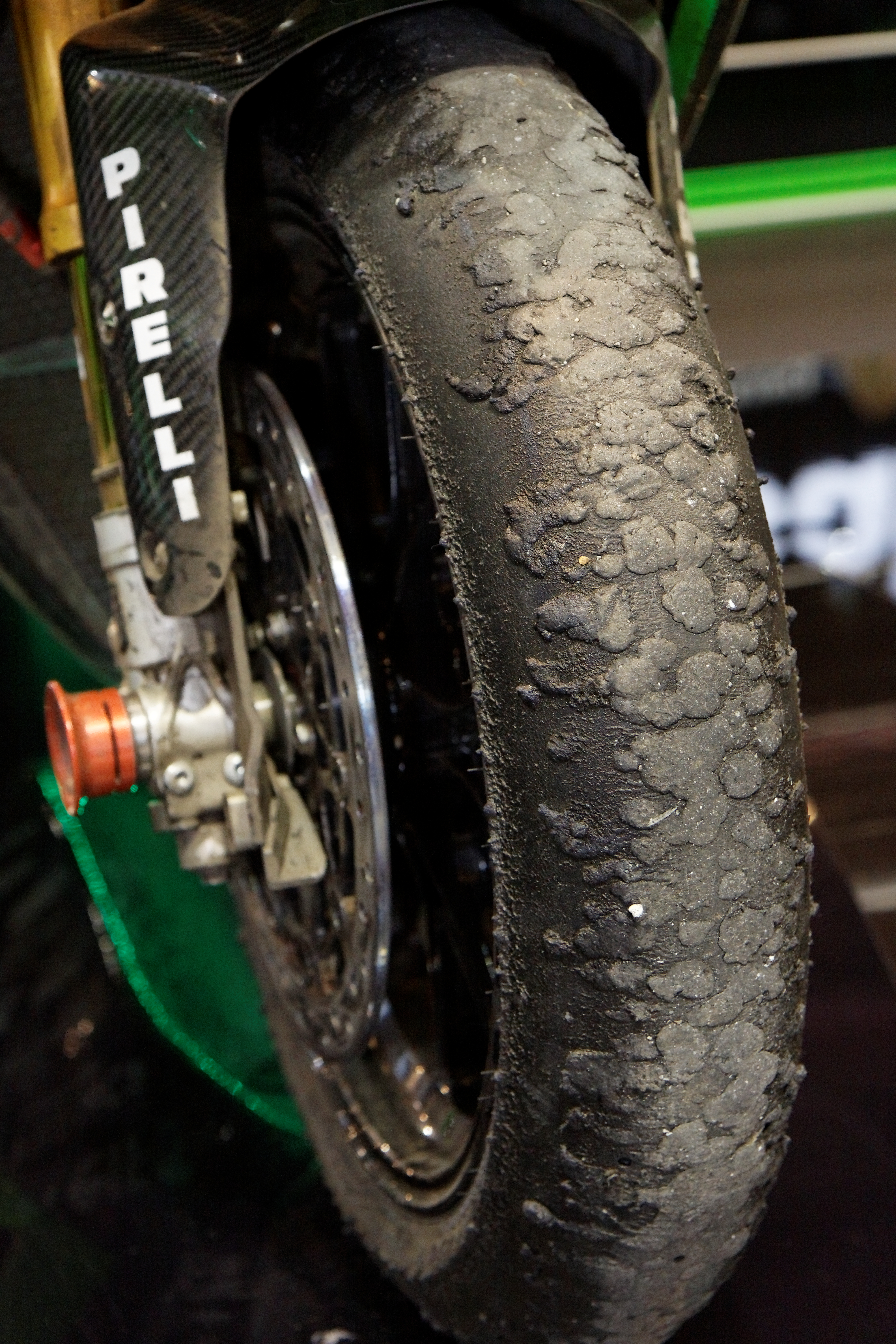 Kawasaki - Ninja ZX-10R Team SRC